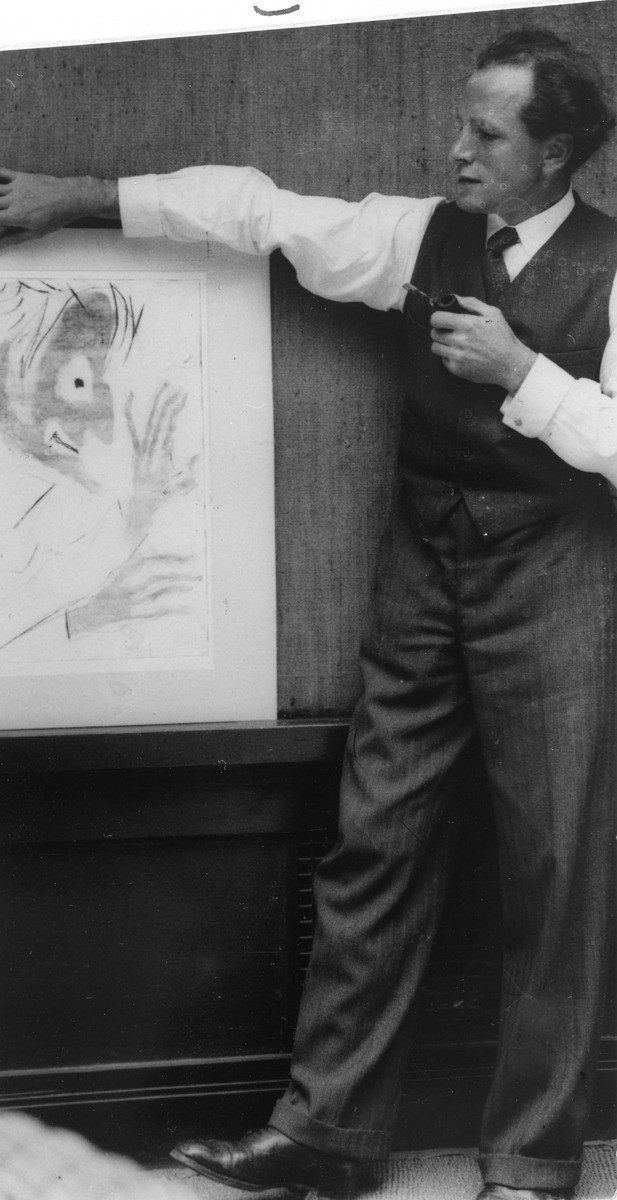 Rolf Nesch (1893–1975) var en tysk-norsk kunstner. Han er mest kjent for sine grafiske arbeider, men arbeidet innen flere disipliner. Nesch regnes som en av Europas fremste og mest banebrytende grafikere, med et særpreget kunstnerisk uttrykk